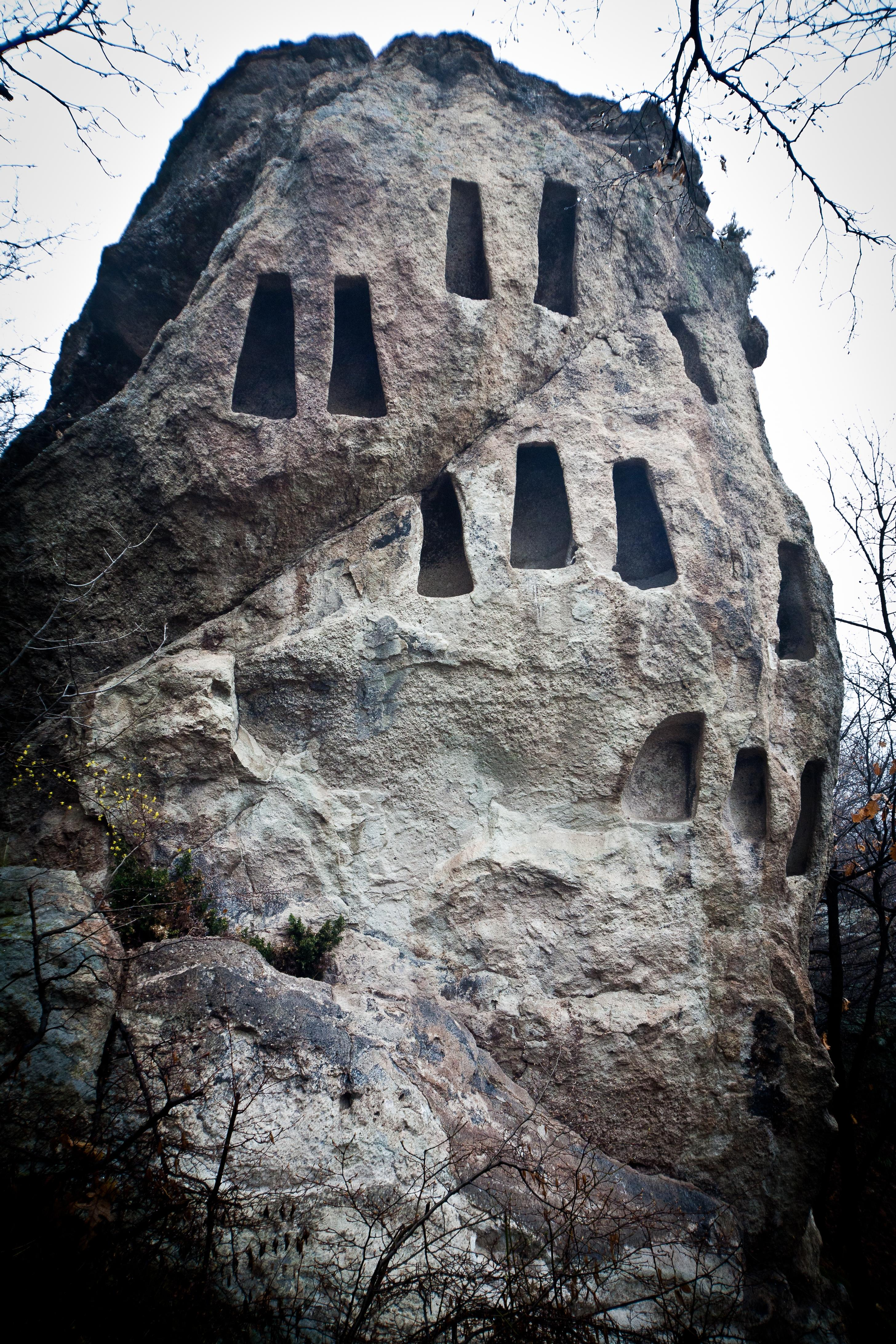 Тракийски култов комплекс край село Ангел войвода, област Хасково